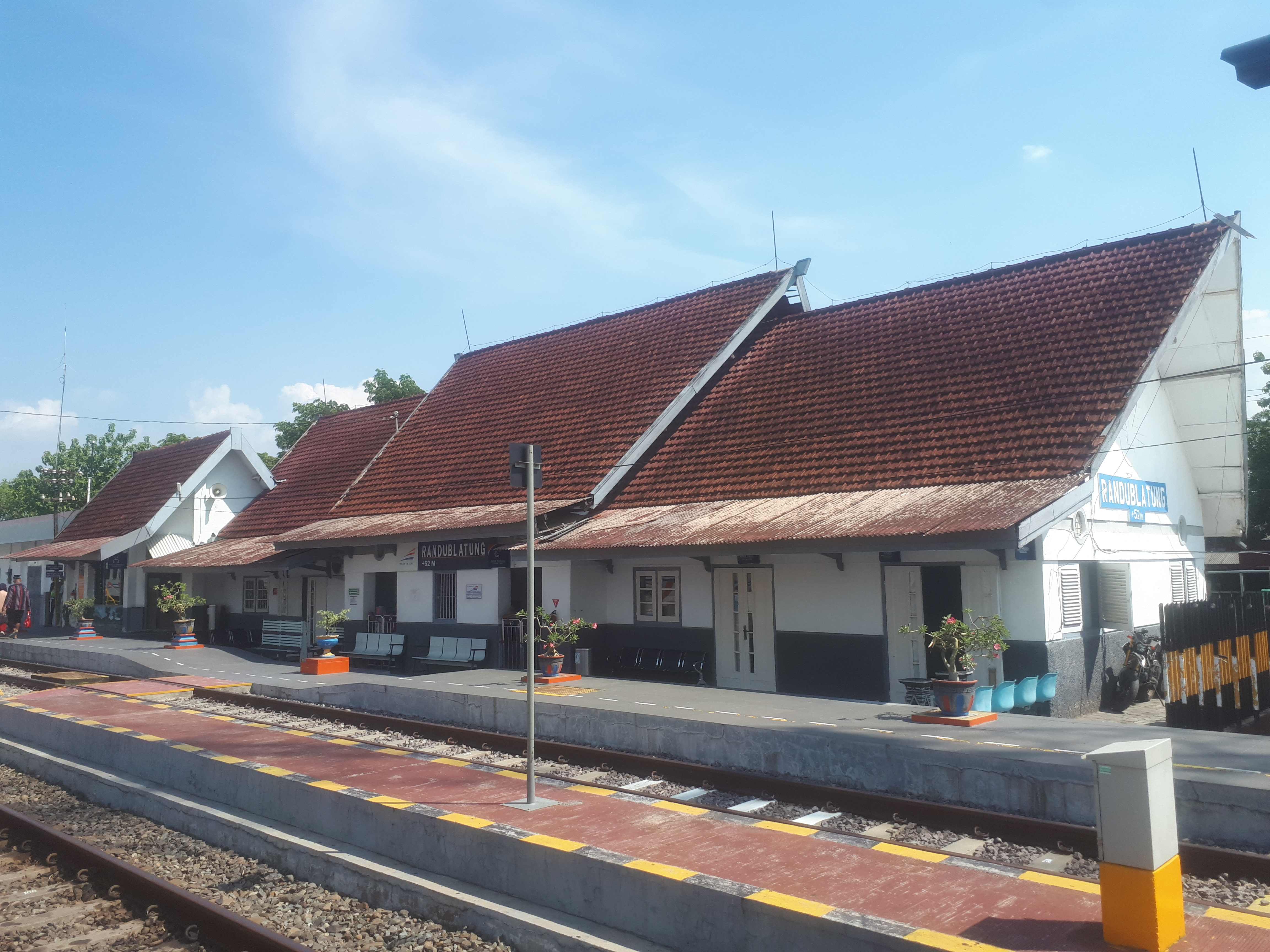 Stasiun Randublatung tahun 2019